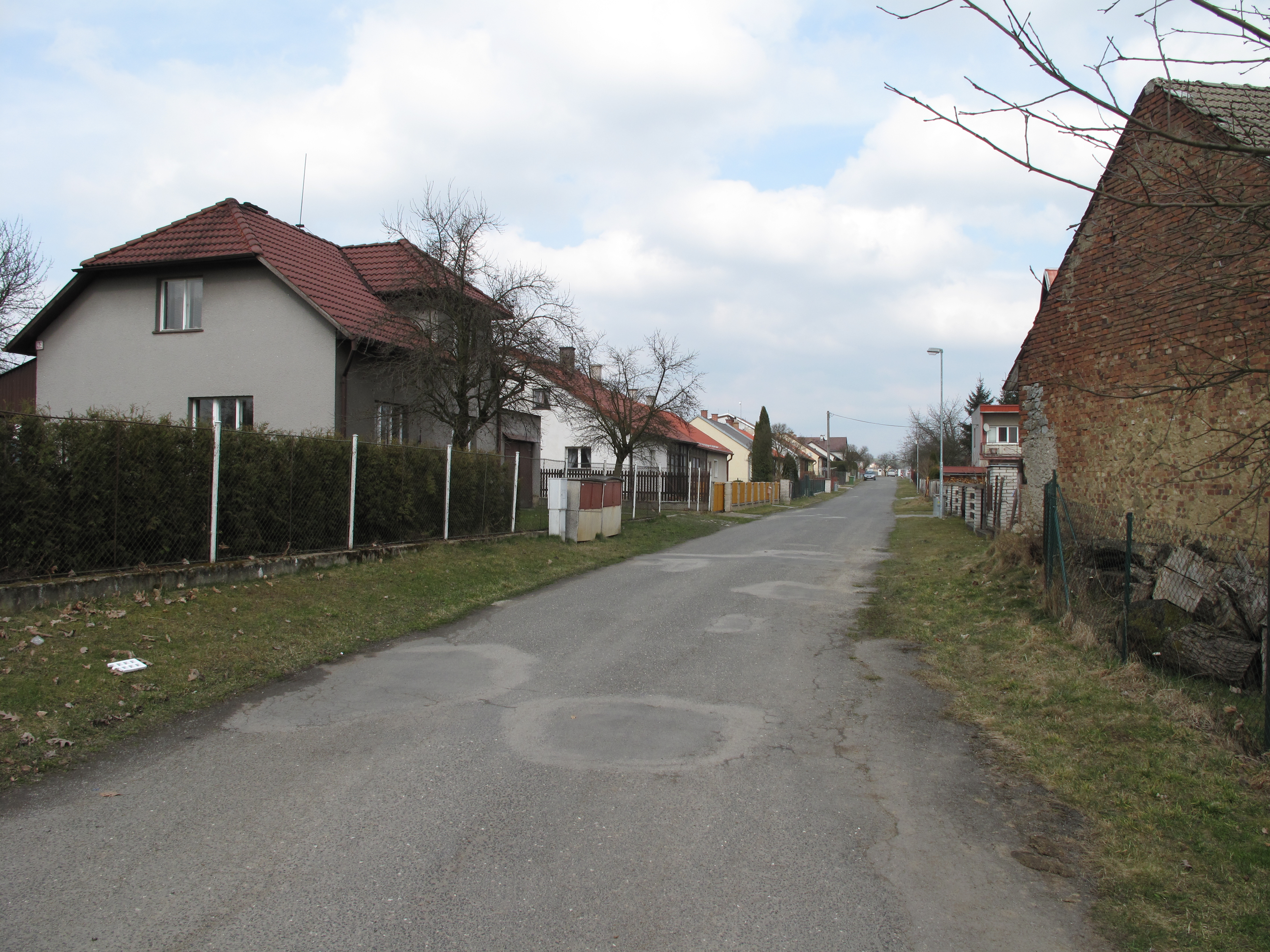 Ulice v Bohumilicích. Okres Havlíčkův Brod, Česká republika.